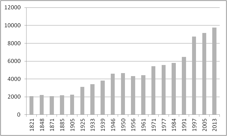 Einwohnerentwicklung der Gemeinde Werlte 1821 - 2013